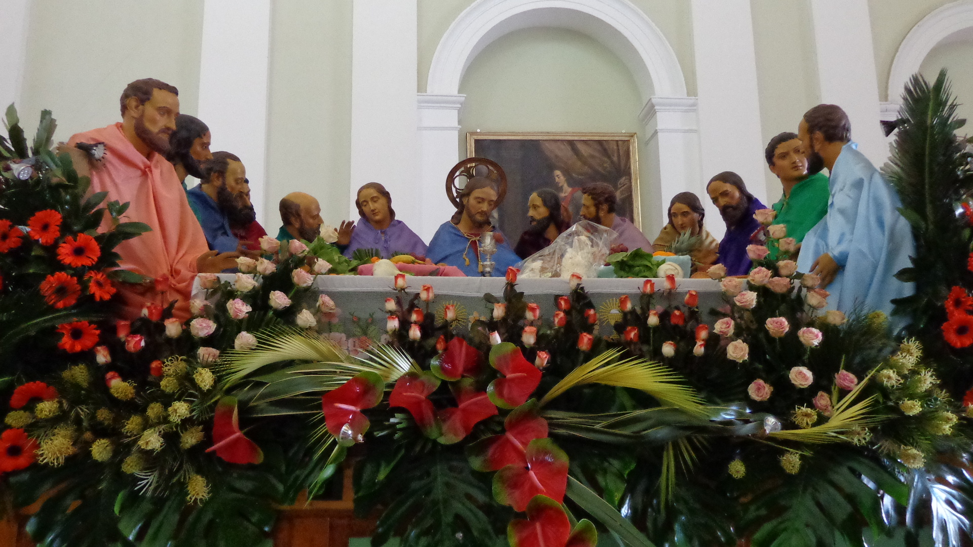 Pasqua 2016 52